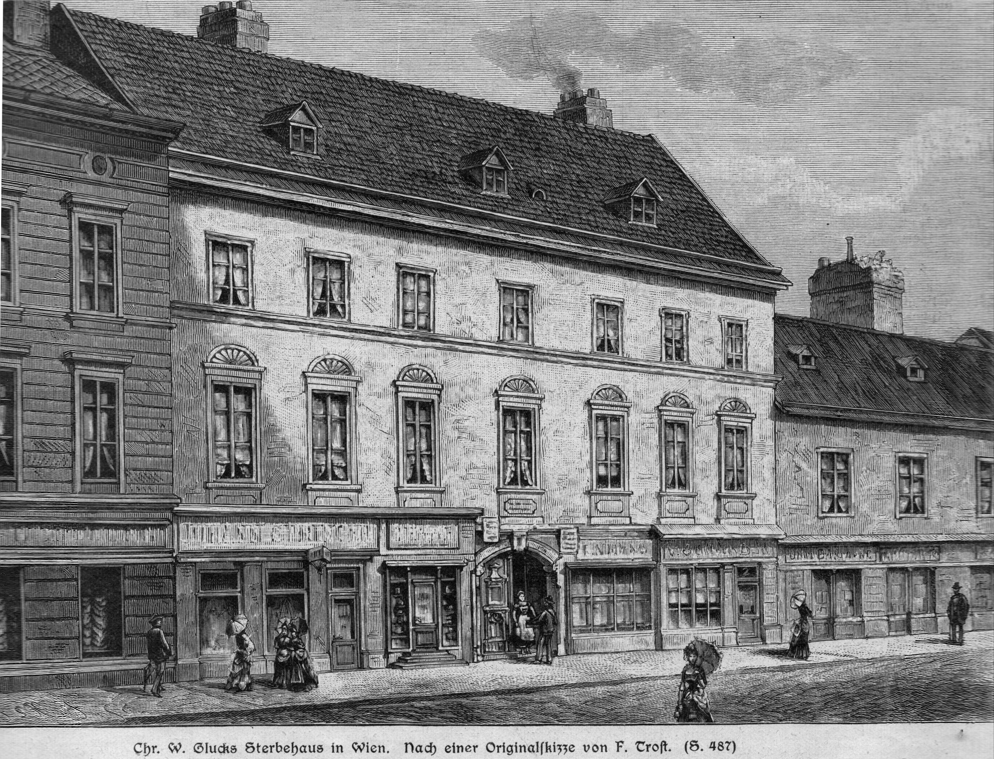 Das Wohn- und Sterbehaus des Komponisten Christoph Willibald Gluck in der Wiedener Hauptstraße Nr. 32 in Wien